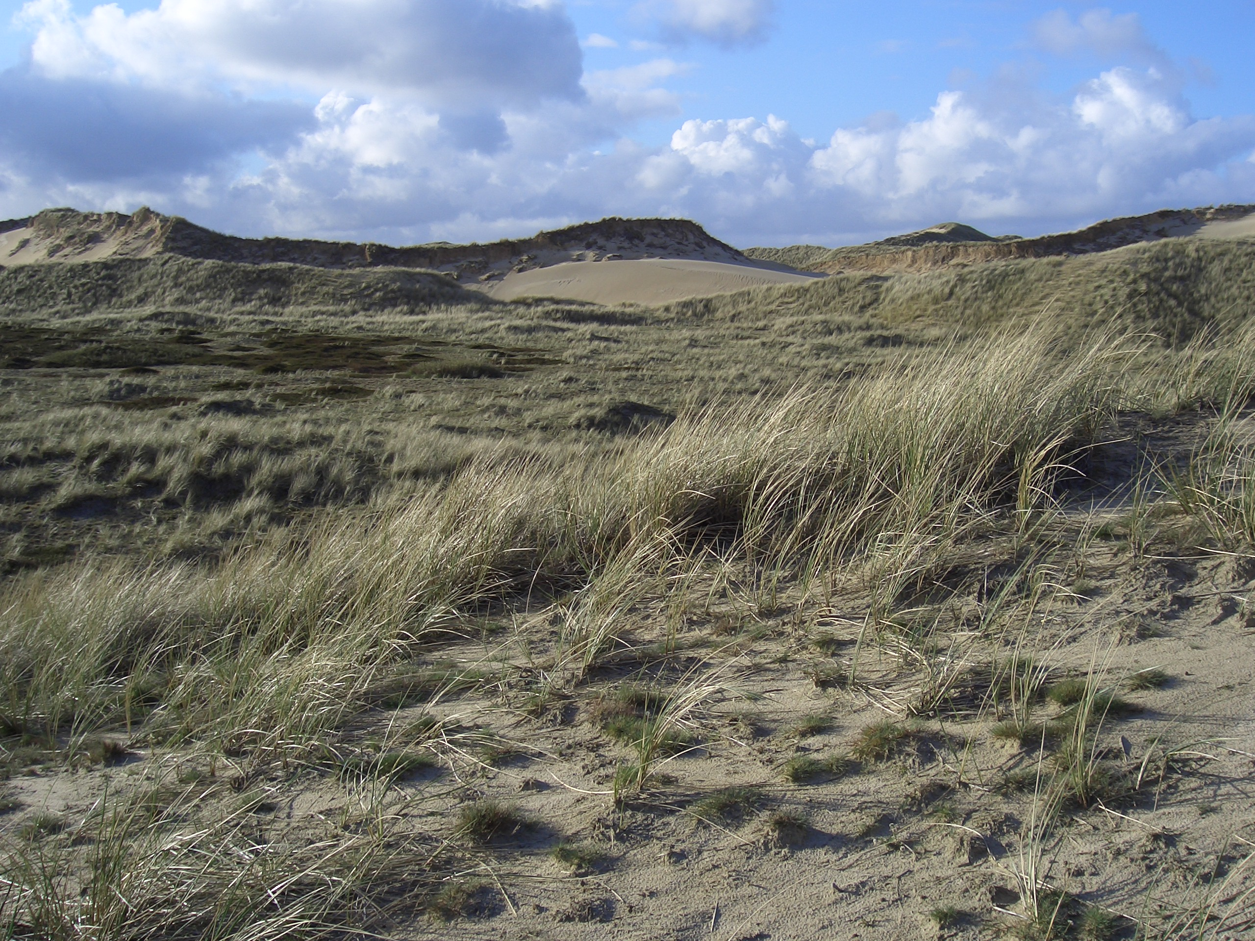 Dünenlandschaft auf Amrum